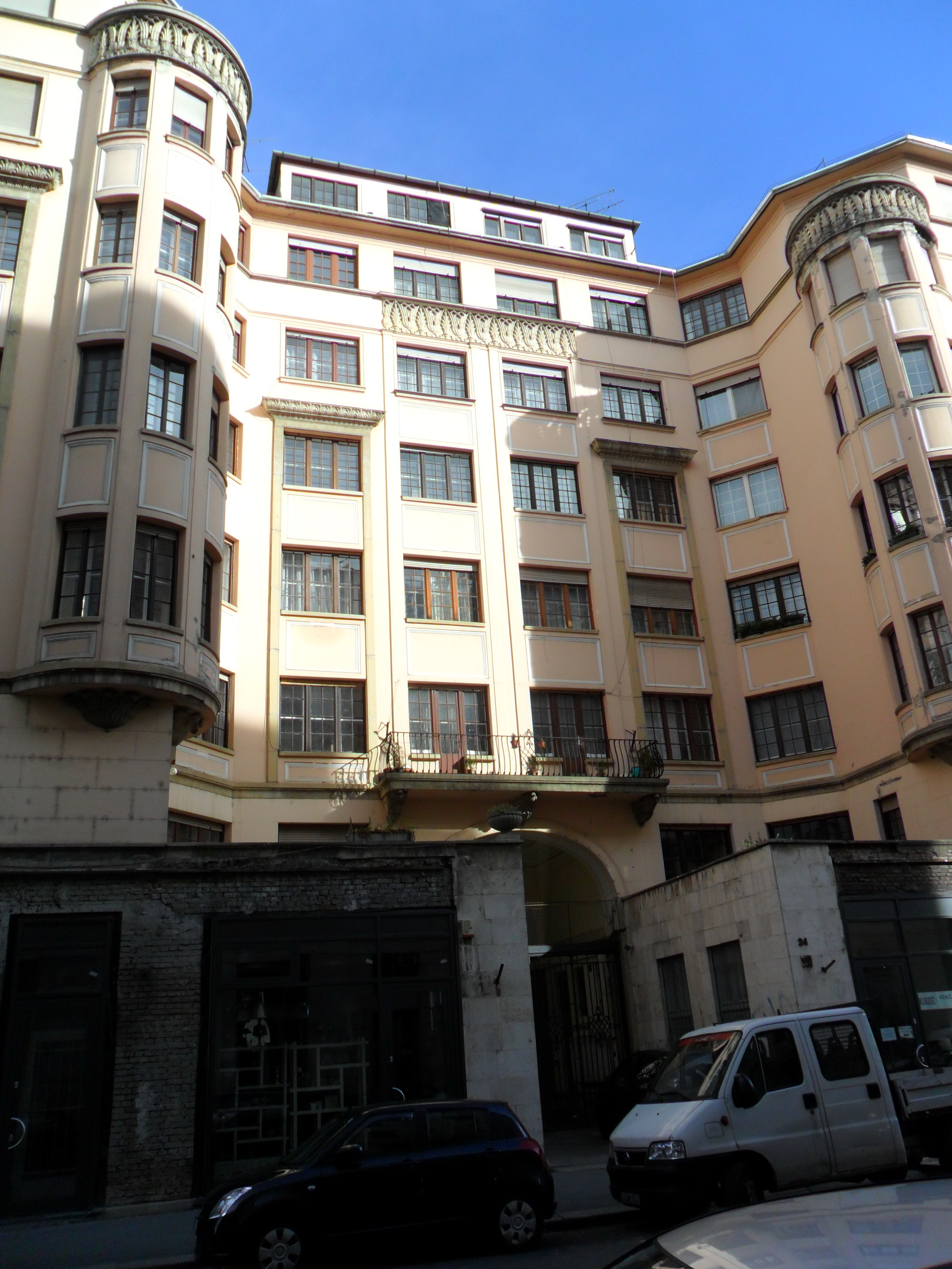 Az egykori Lenz testvérek déligyümölcs kereskedő cég székhelye, a Lenz bérház (Budapest IX, Lónyay utca 24.)